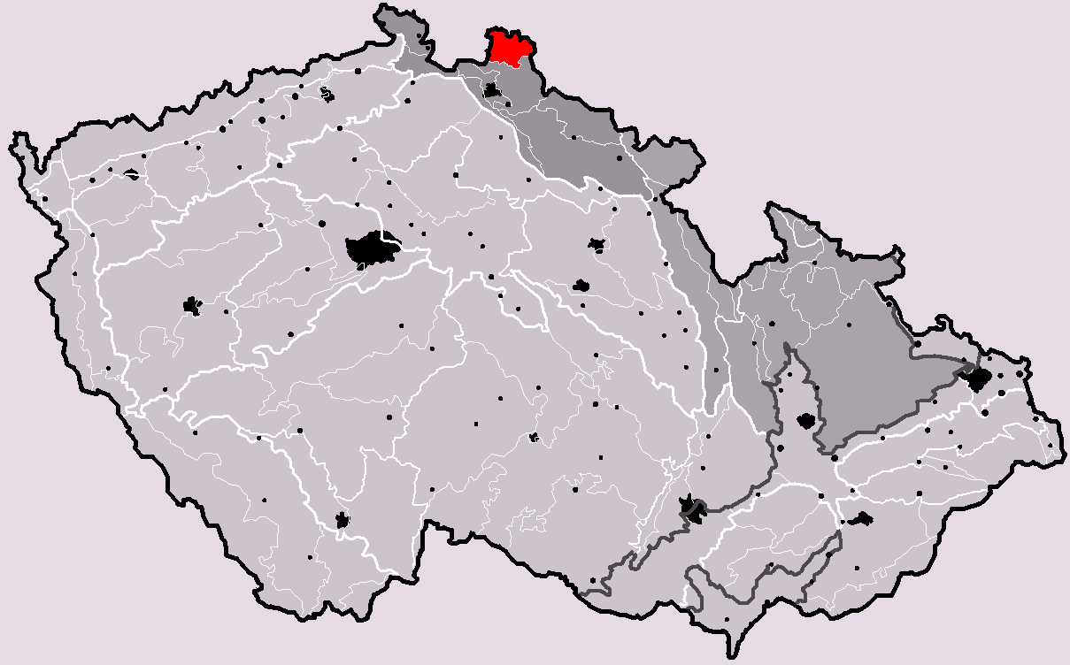 Poloha geomorfologického celku Frýdlantská pahorkatina v rámci České republiky. Hercynský systém Hercynská pohoří I Česká vysočina I4 (IV) Krkonošsko-jesenická subprovincie I4A (IVA) Krkonošská oblast I4A-5 (IVA-5) Frýdlantská pahorkatina